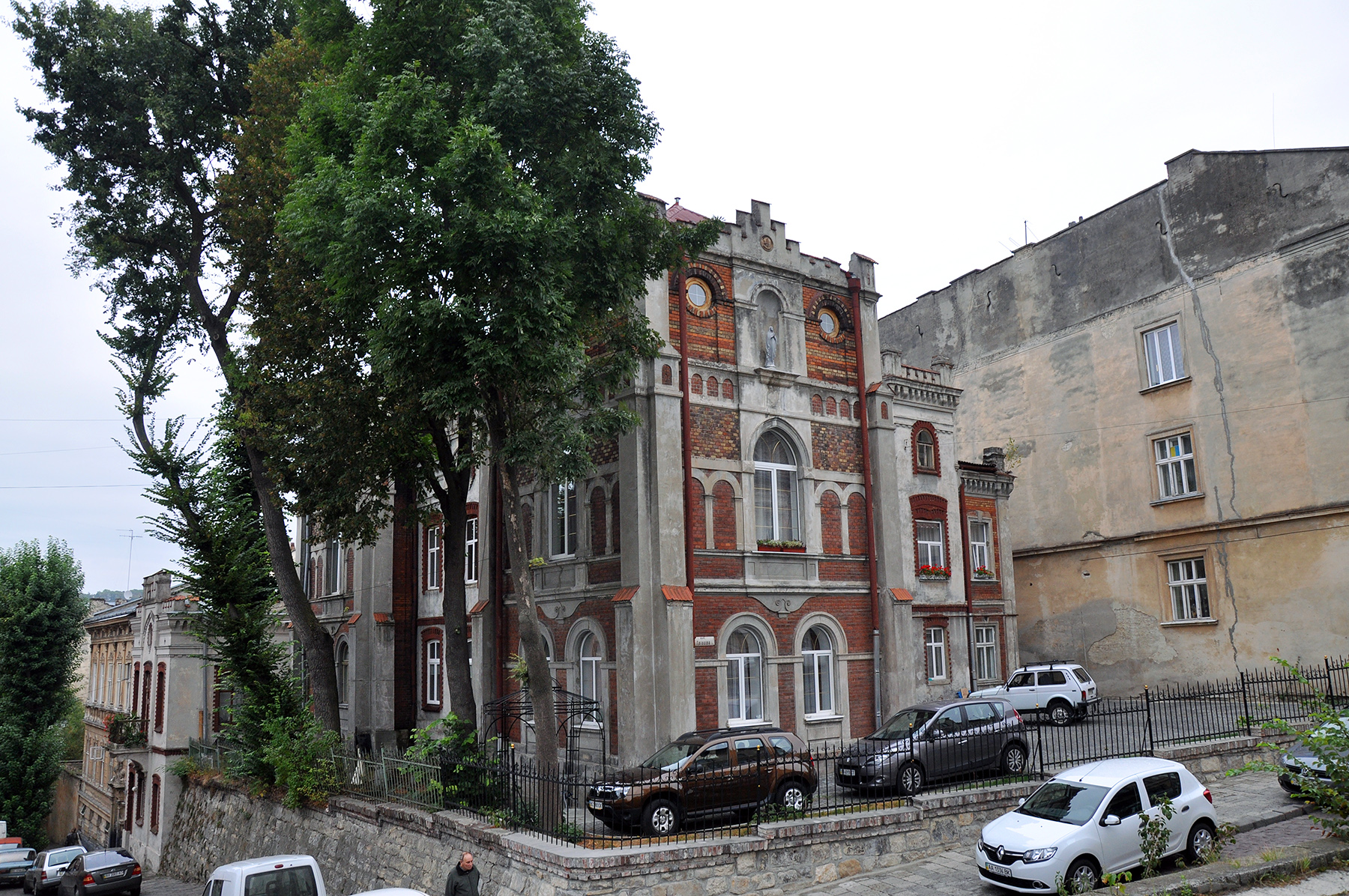 житловий будинок, Львів, Глібова Л., 12